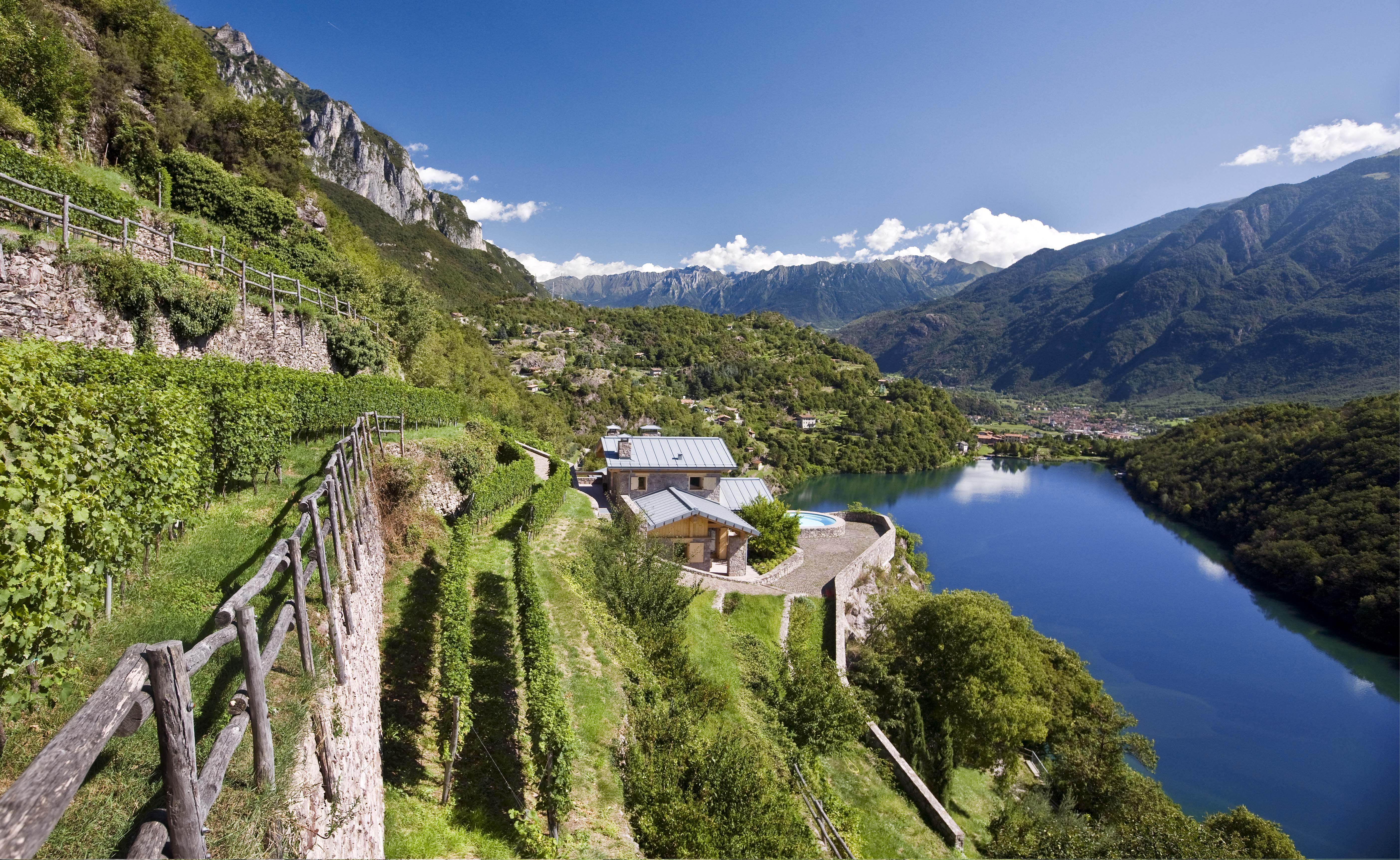 Suggestivo scorcio sui vigneti terrazzati della Valcamonica al Lago Moro da cui ha origine Griso - località Scraleca